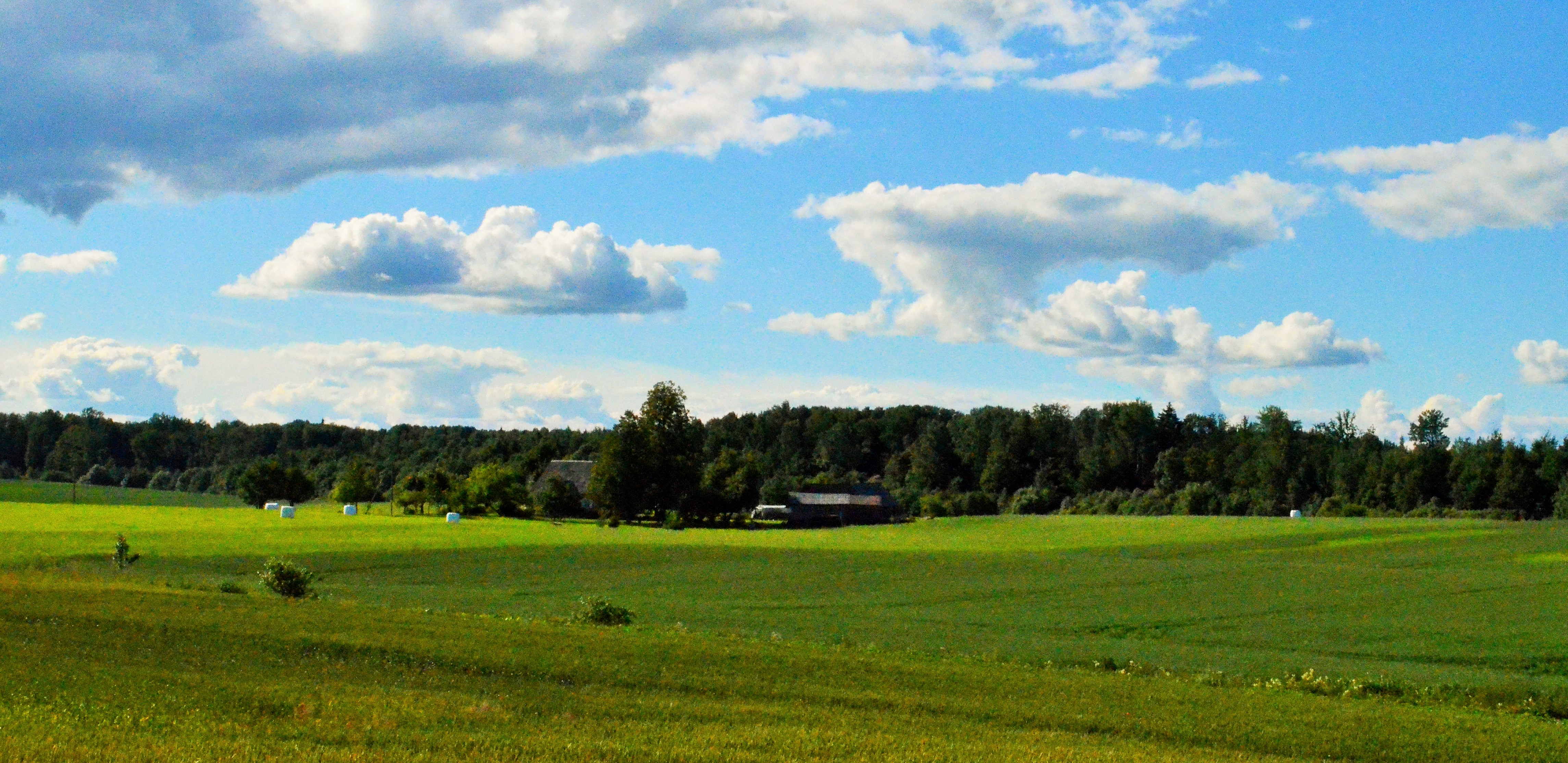 Pajuodžiai, Širvintų raj.